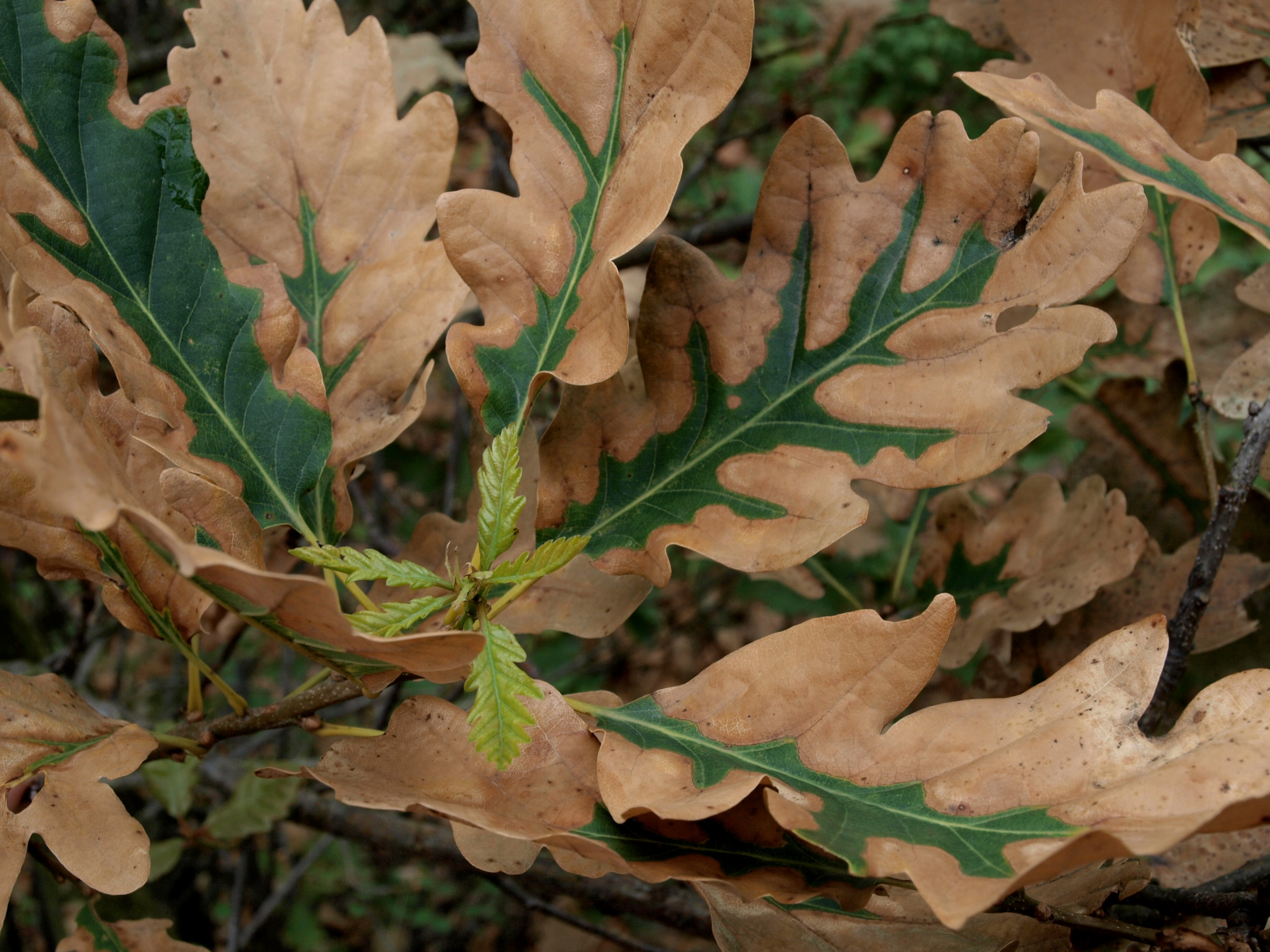 vliv sucha na dub; obrázek vznikl pro potřeby ČHMÚ dokumentovat sucho r. 2015